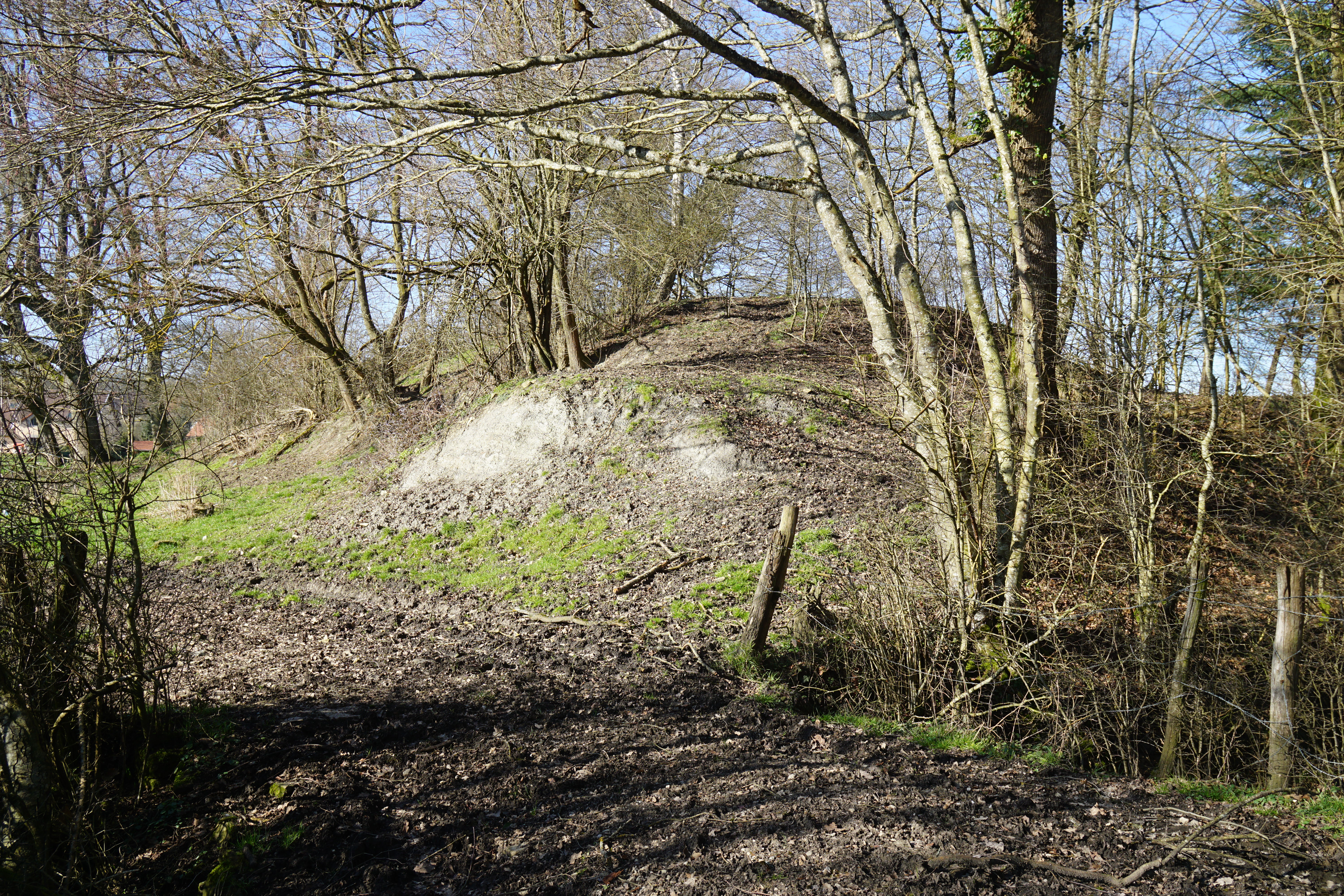 Le terril de la galerie Sainte-Barbe (Houillères de Vy-lès-Lure).